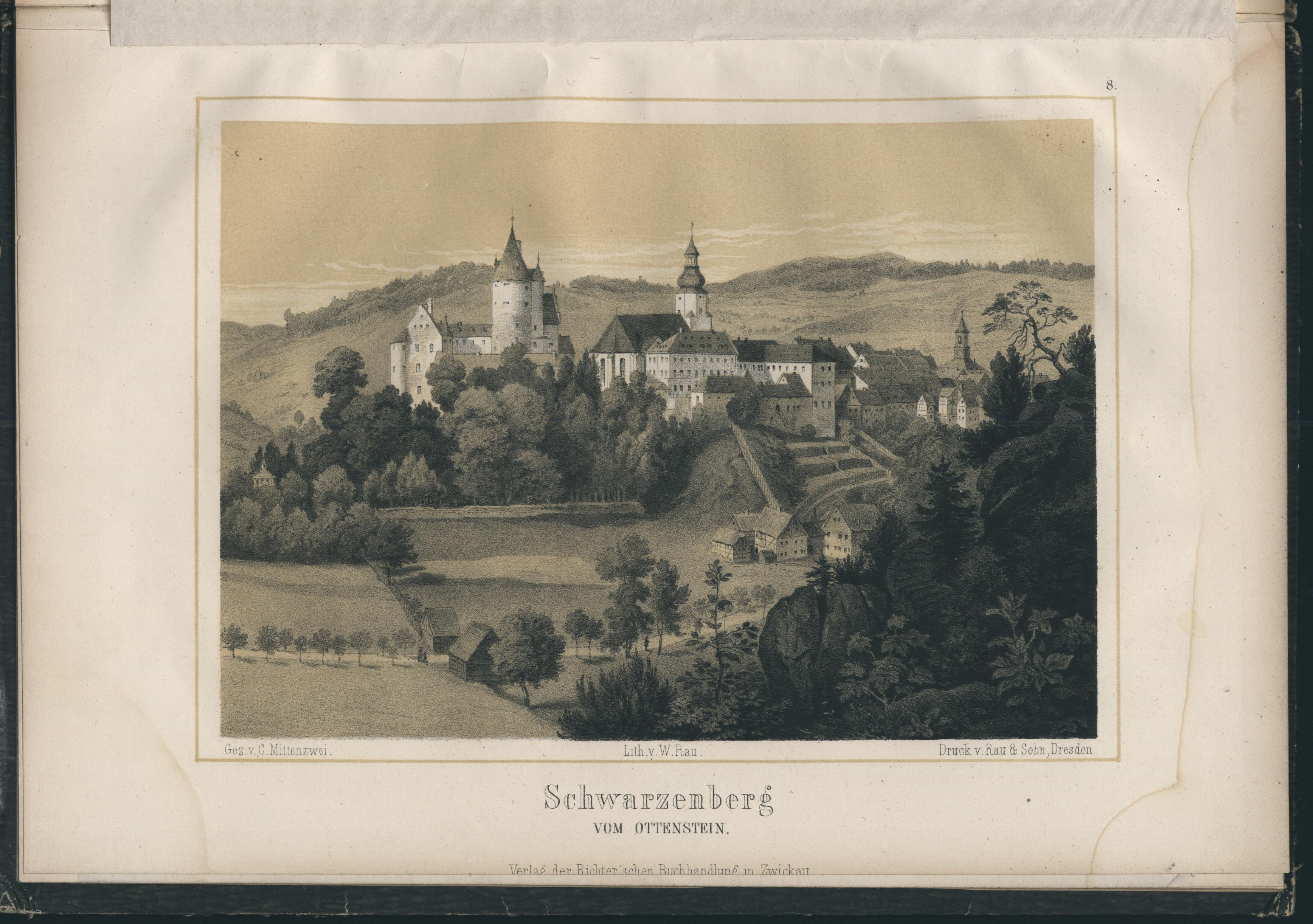 Seite aus: Album der Obererzgebirgischen Staats-Eisenbahn